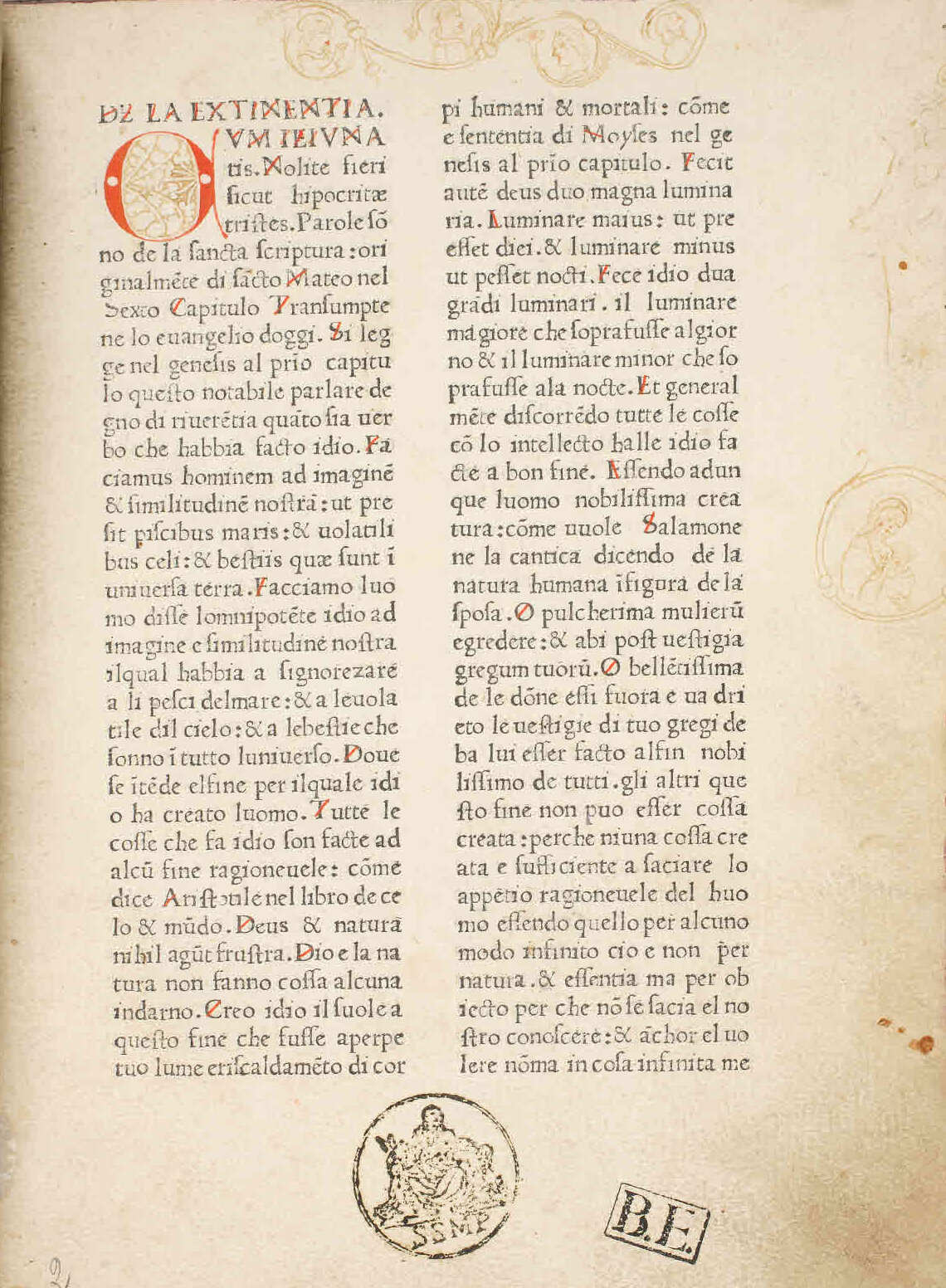 Incipit